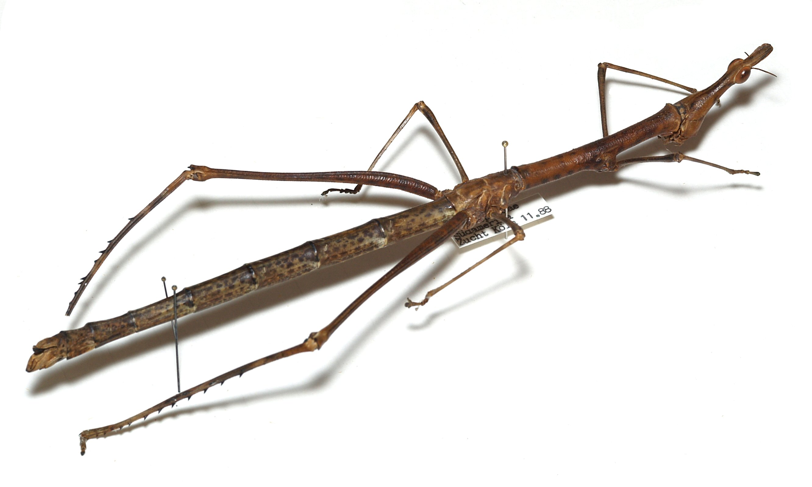 undetermined Proscopiidae species.